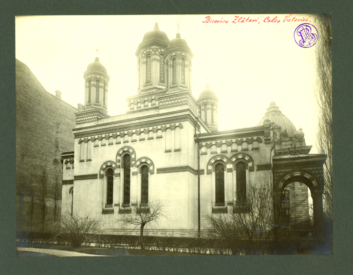 Adler - Biserica Zlătari